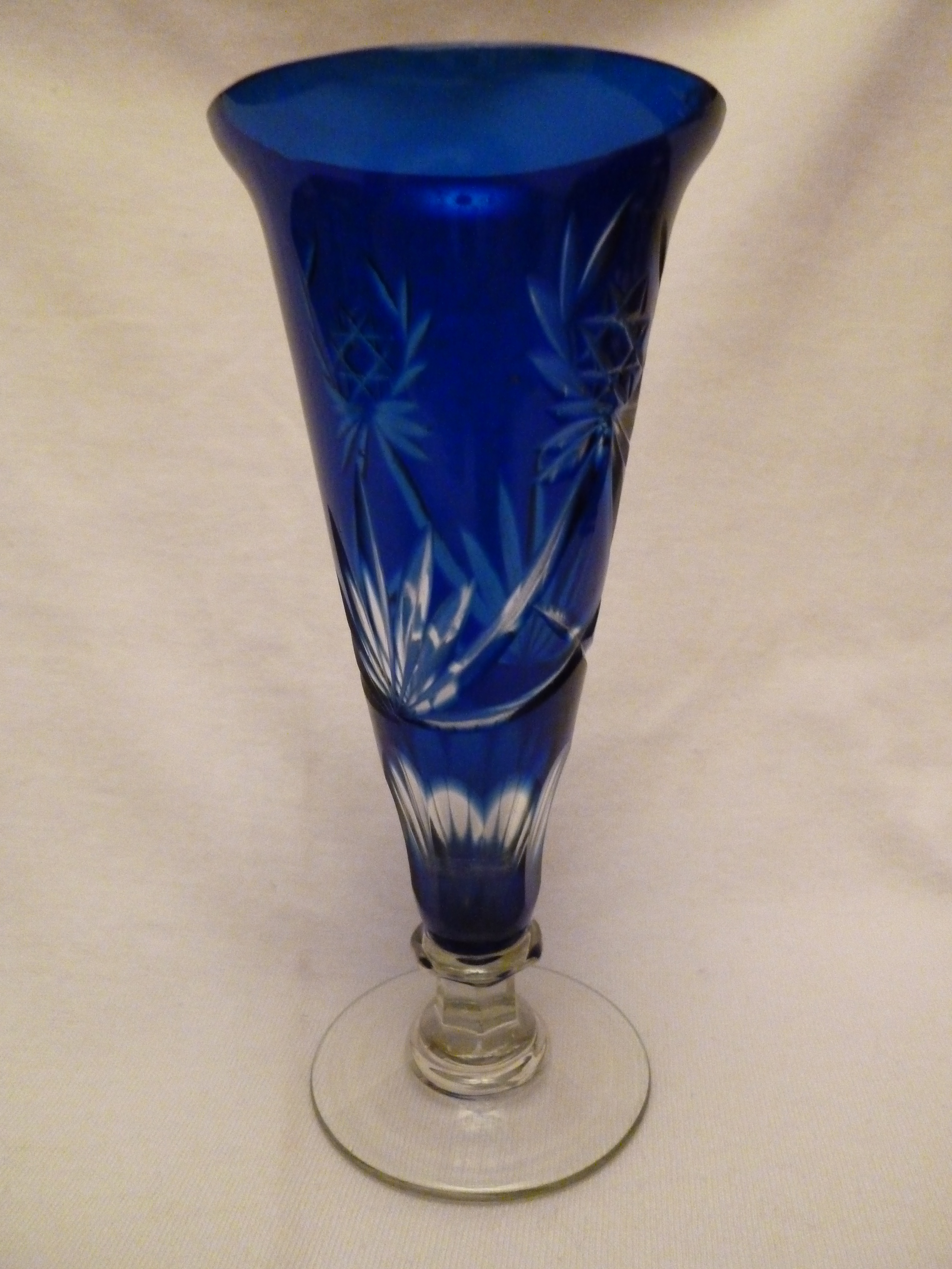 Стопка-лафитник из тонкого гранёного стекла. Первая половина ХХ века.